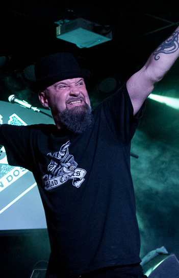 Def Con Dos - Zaragoza .es/2014/05/def-con-dos-zaragoza-sala-lo...